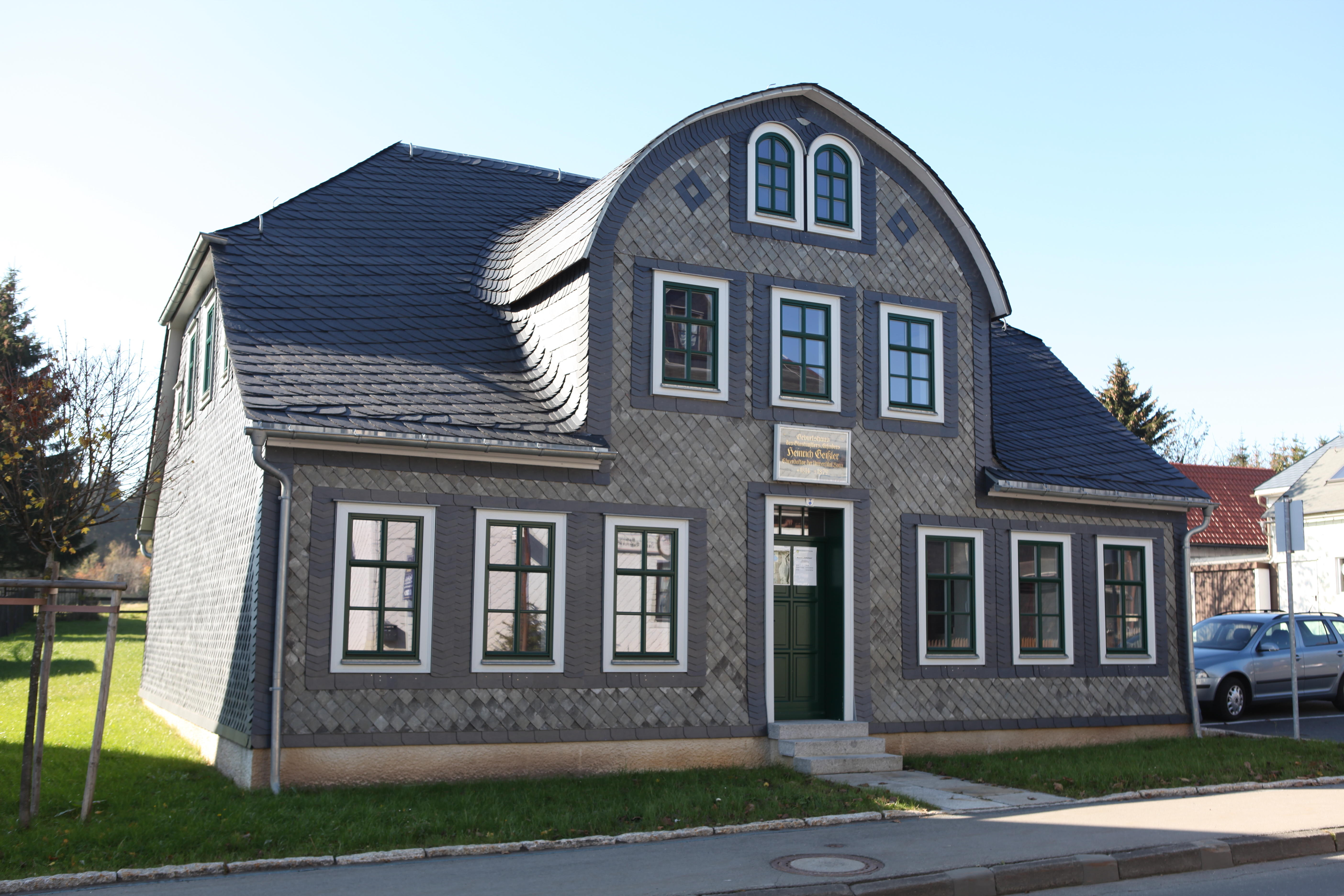 Heimatmuseum Geißlerhaus, 18./19. Jh. Elternhaus von Heinrich Geißler, Neuhaus am Rennweg, Sonneberger Straße 106